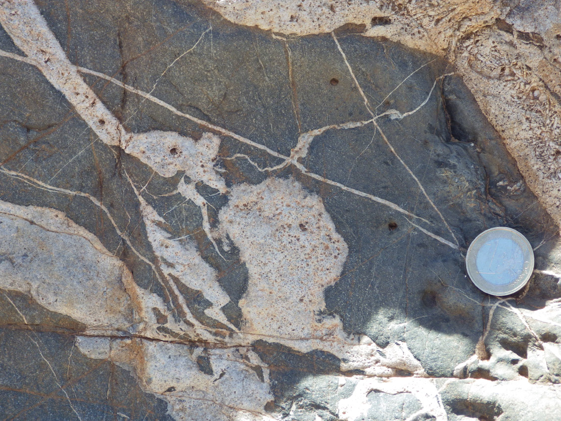 xenolito